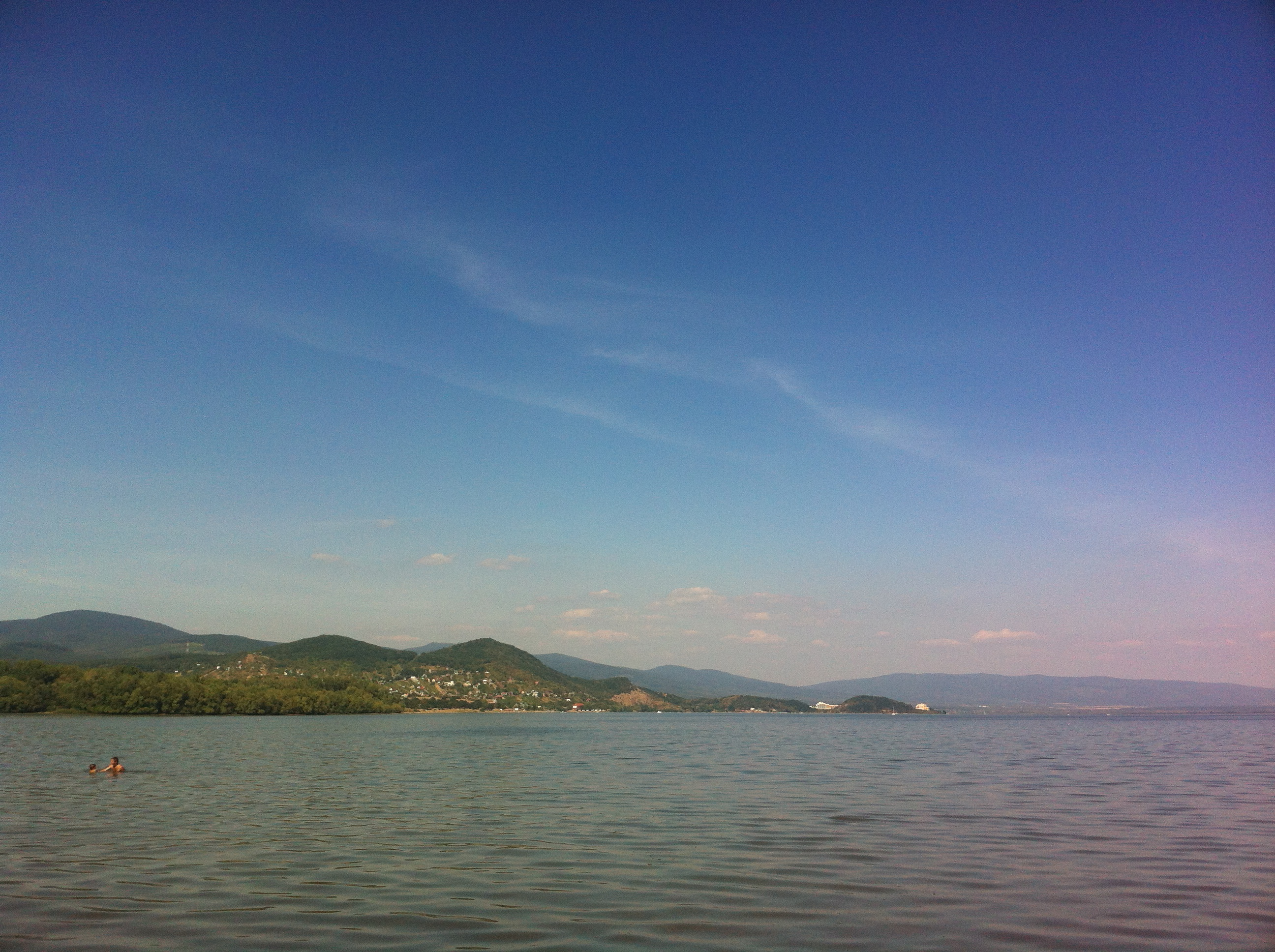 Zemplínska šírava 2013, Slovakia